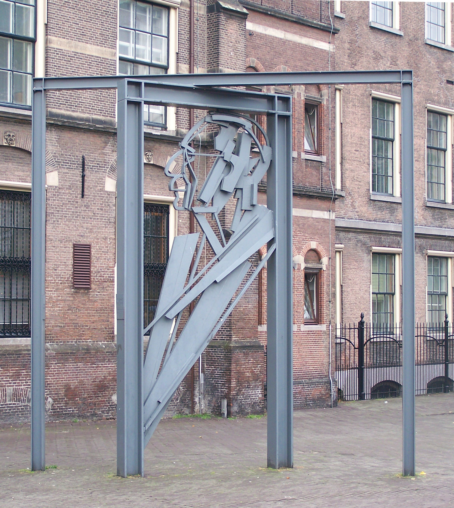 Foto zelf gemaakt. Monument ter nagedachtenis aan Willem Drees, gemaakt door Eric Claus in 1988. Het staat voor de ingang van het Binnenhof aan de Hofweg zijde.